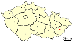 Město Vsetín na mapě České republiky